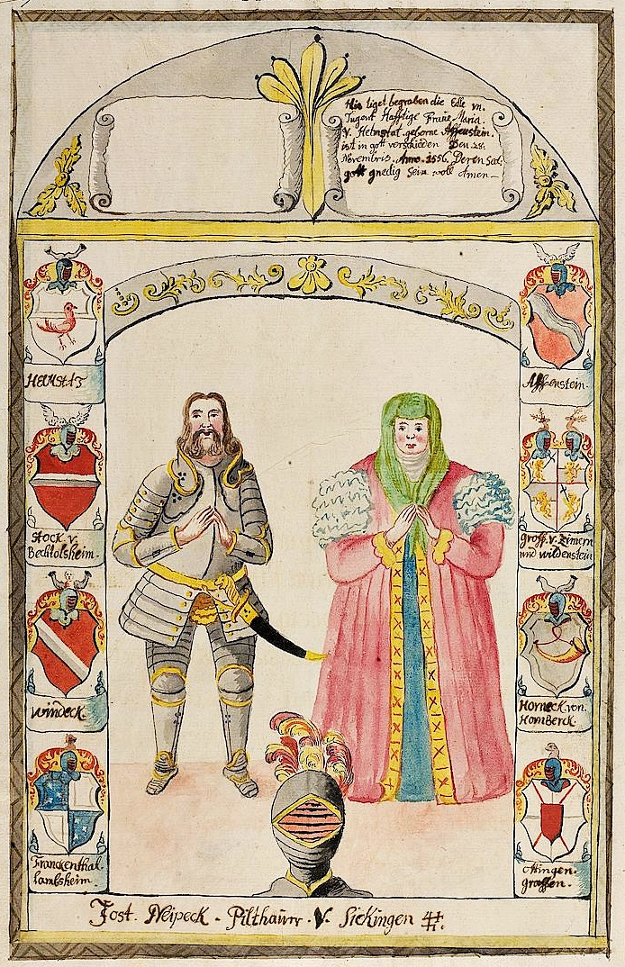 Lambsheim (jetzt Museum Speyer) Epitaph Jakob von Helmstatt und Gemahlin Maria von Affenstein († 1556)